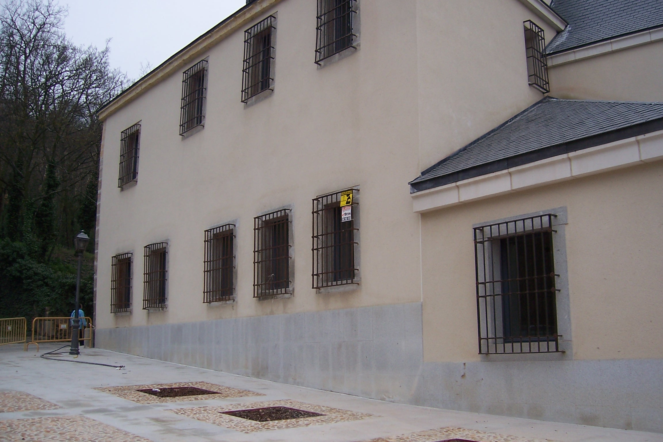 Casas de la antigua fábrica de moneda de la ciudad española de Segovia.